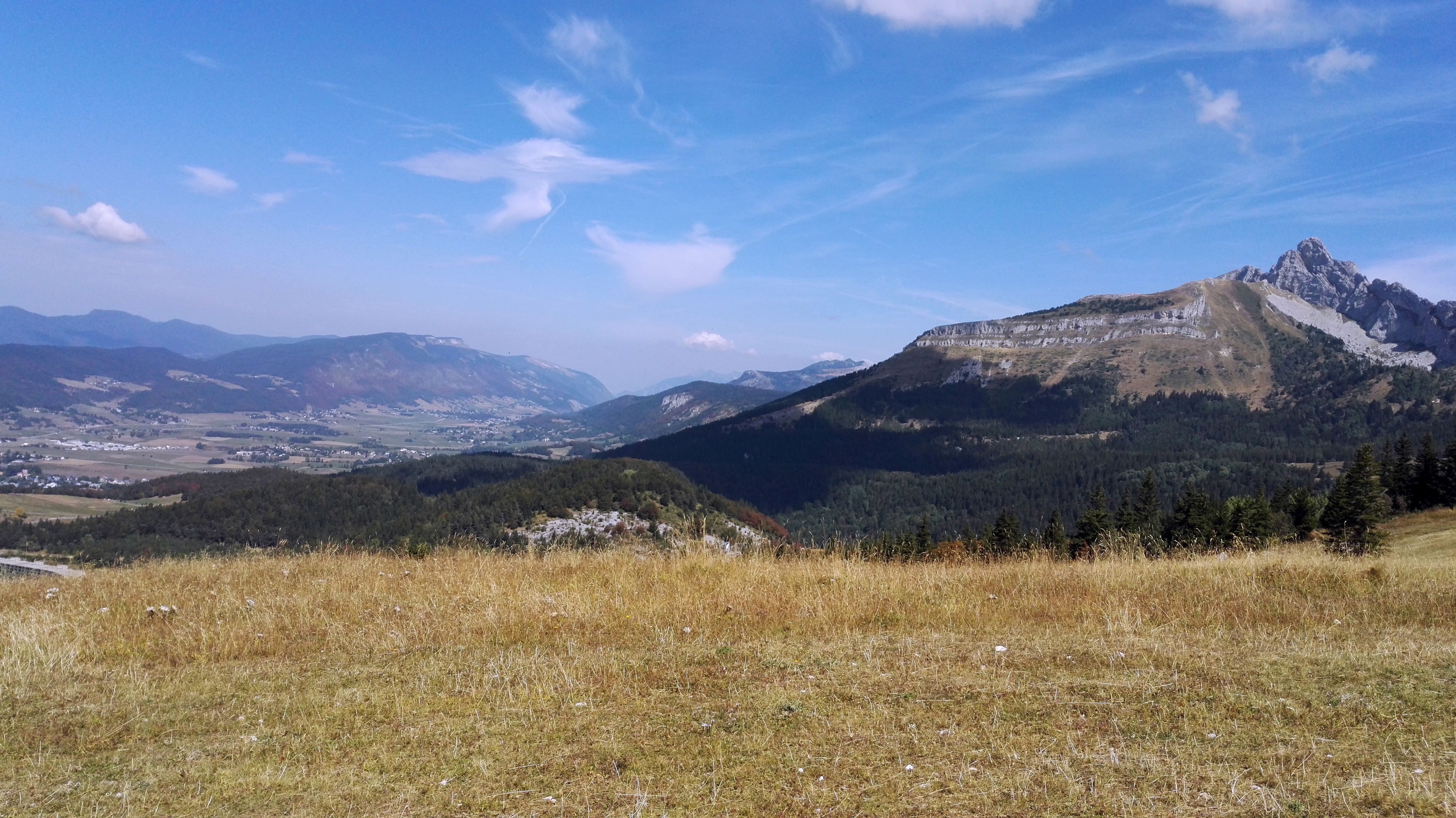 Le Roc Cornafion vu depuis la Côte 2000 à Villard-de-Lans